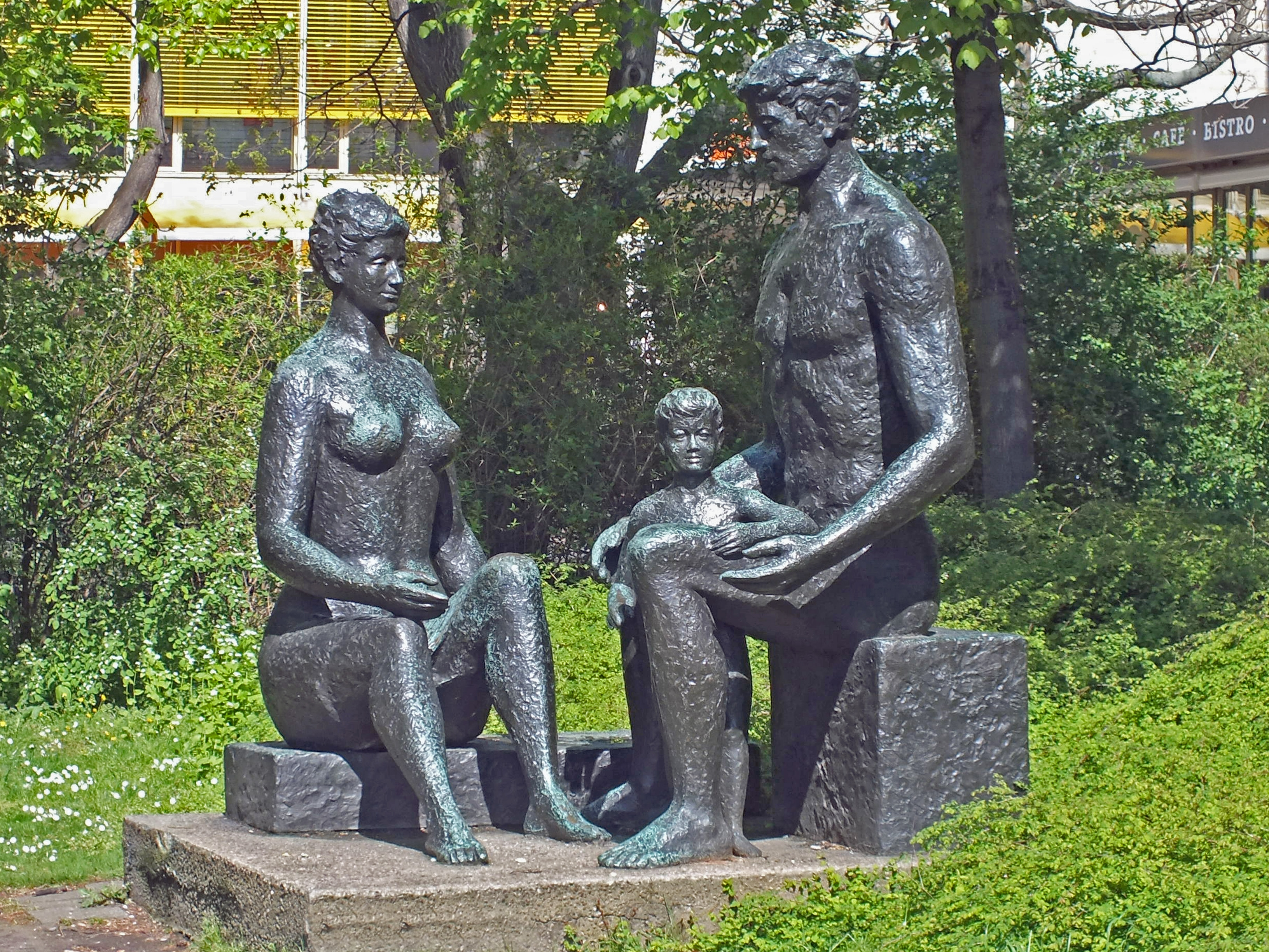 "Familie", Plastik von Rudolf Oelzner (um 1970) in der Karl-Liebknecht-Straße in Leipzig